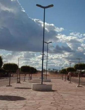 xxx